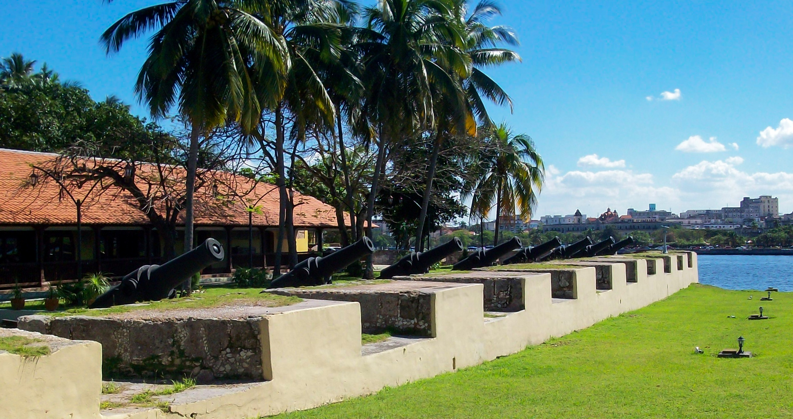 Bateria La Divina Pastora, en el Castillo de los tres reyes del Morro en la Habana, cuba